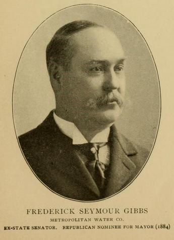 Frederick S. Gibbs